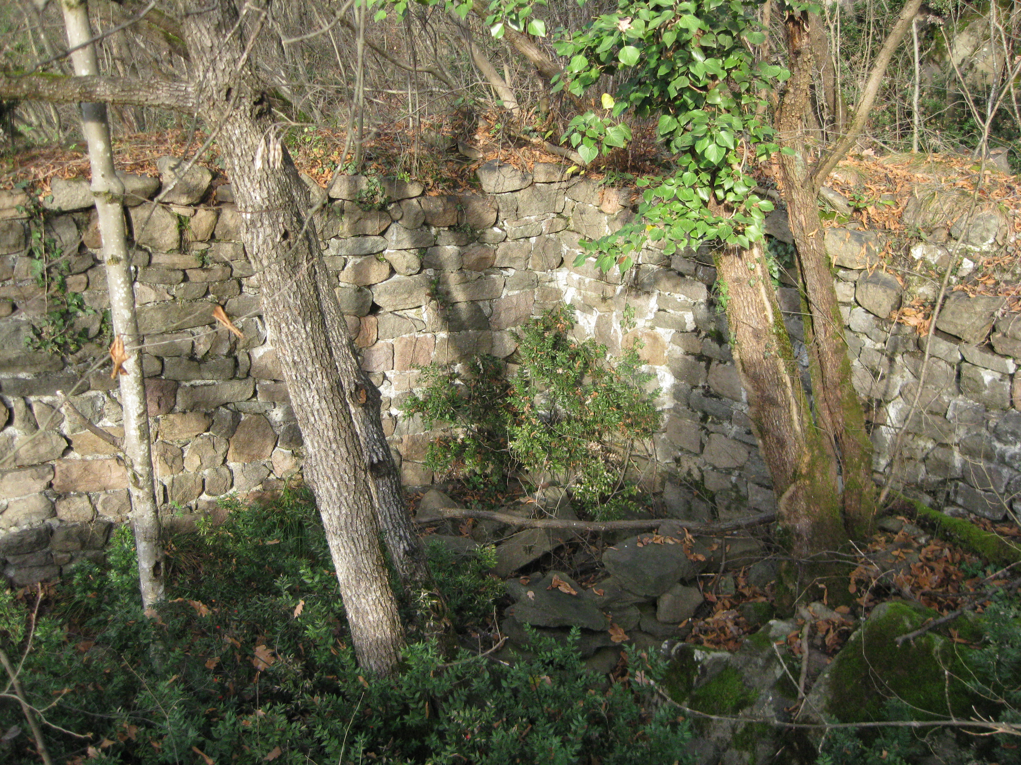 Der Tinzlturm (auch Turm an der Tinzlleiten oder Dinzlleiten genannt) ist eine heute schwer zugängliche Ruine bei St. Jakob in der Gemeinde Leifers in Südtirol. Geschichte und früherer Name des Gemäuers sind unbekannt, es scheint sich jedoch um einen Turm gehandelt zu haben, der einst die Kreuzung der alten Straße von Leifers nach Bozen mit dem inzwischen verwachsenen Steig zum hoch über dem Etschtal gelegenen Weiler Seit bewachte. Die Überreste des mittelalterlichen Gemäuers stehen heute unter Denkmalschutz. Dieses Bild zeigt einen Blick auf das Innere des Turms.